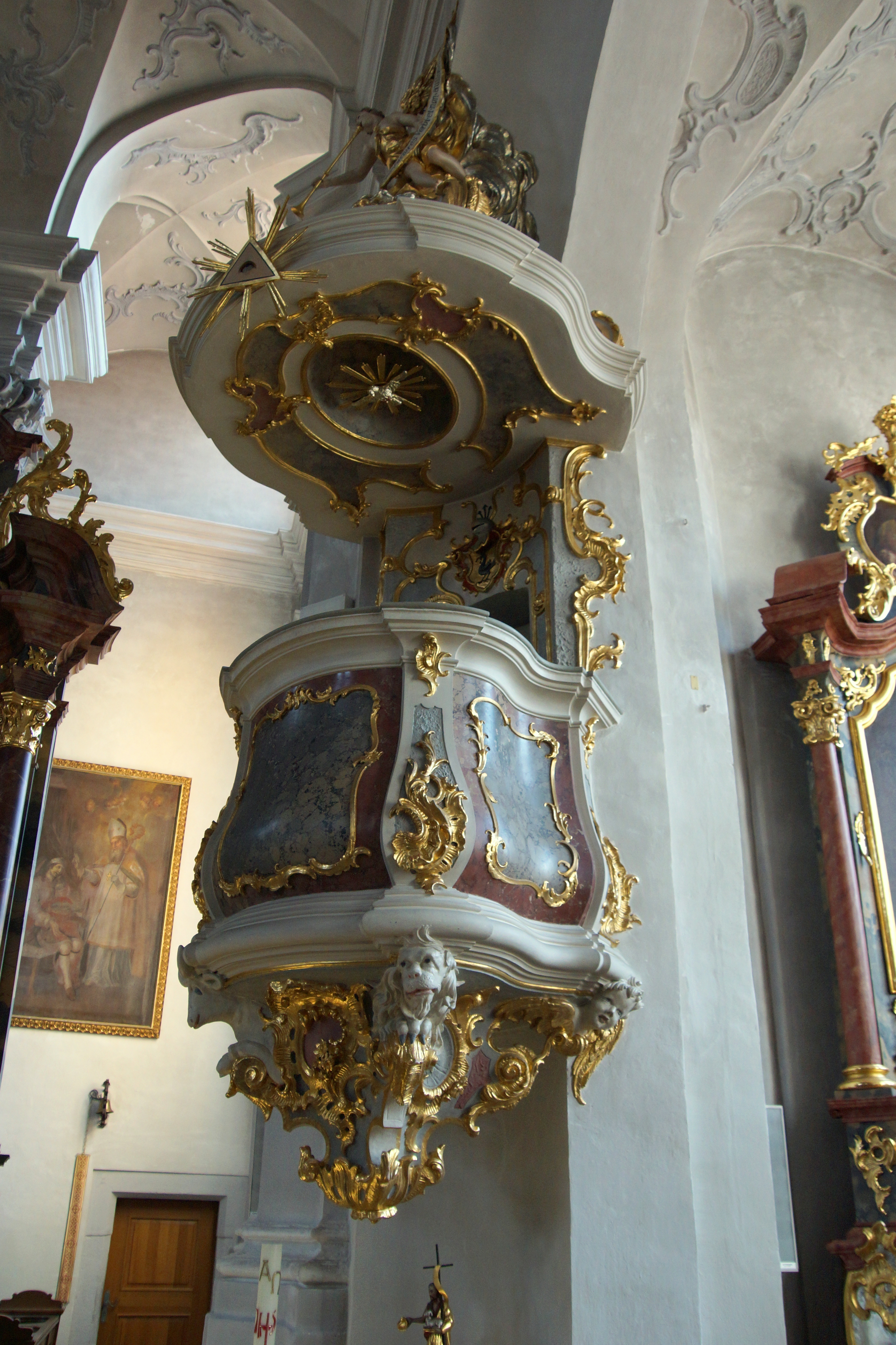 Die katholische Pfarrkirche Mariä Himmelfahrt in Berching in der Oberpfalz